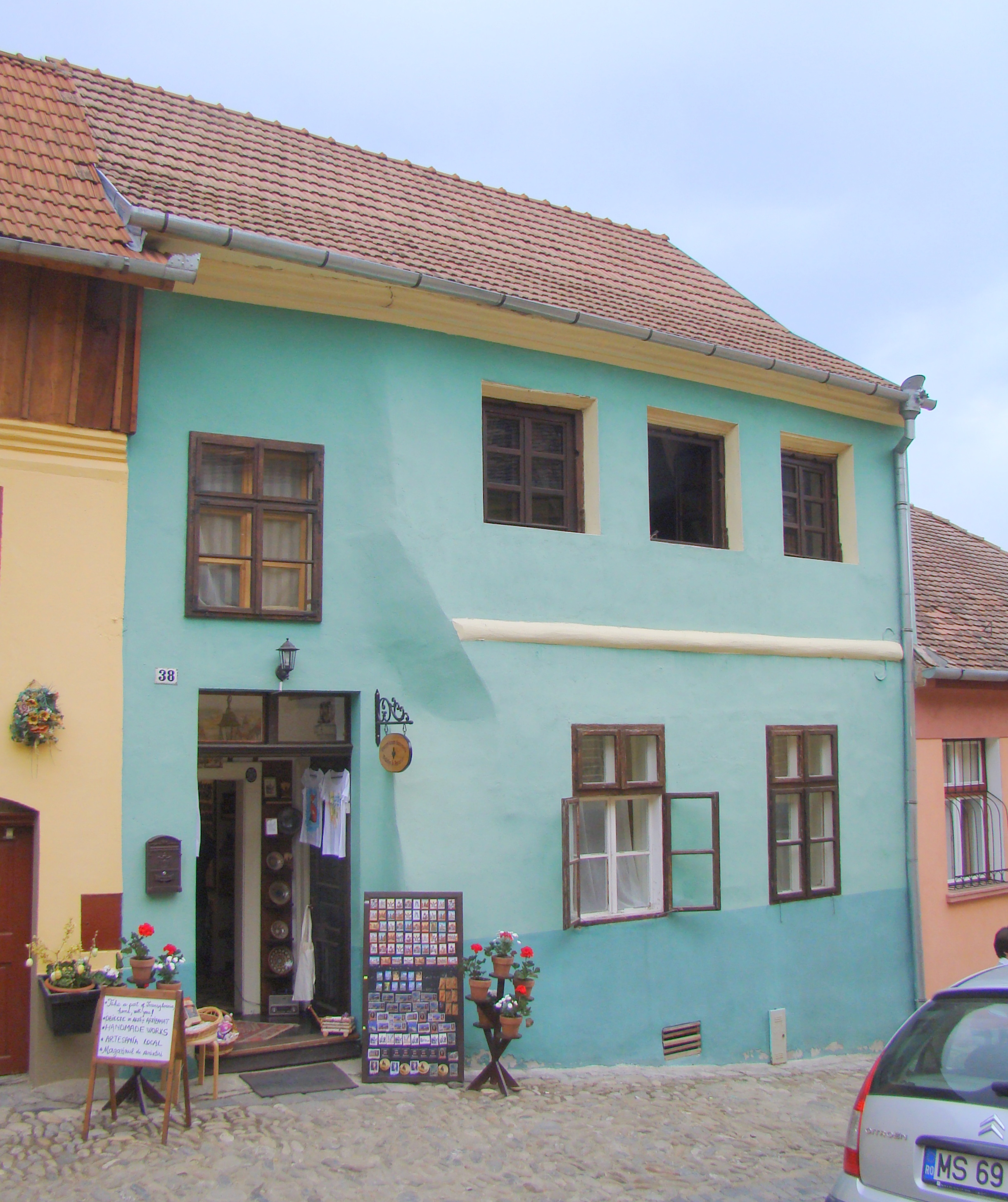 Casa Kuntz, municipiul Sighișoara, str. Tâmplarilor 38 1600 - 1625